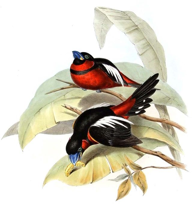 Cymbirhynchus macrorhynchos (Great-billed Eurylaime)